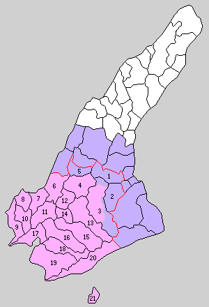 兵庫県三原郡の町村制時点の町村。